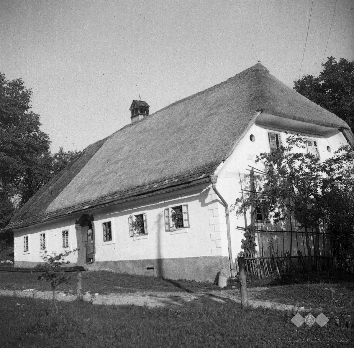 Prednja stran Kosorepčeve hiše, Velike Češnjice.